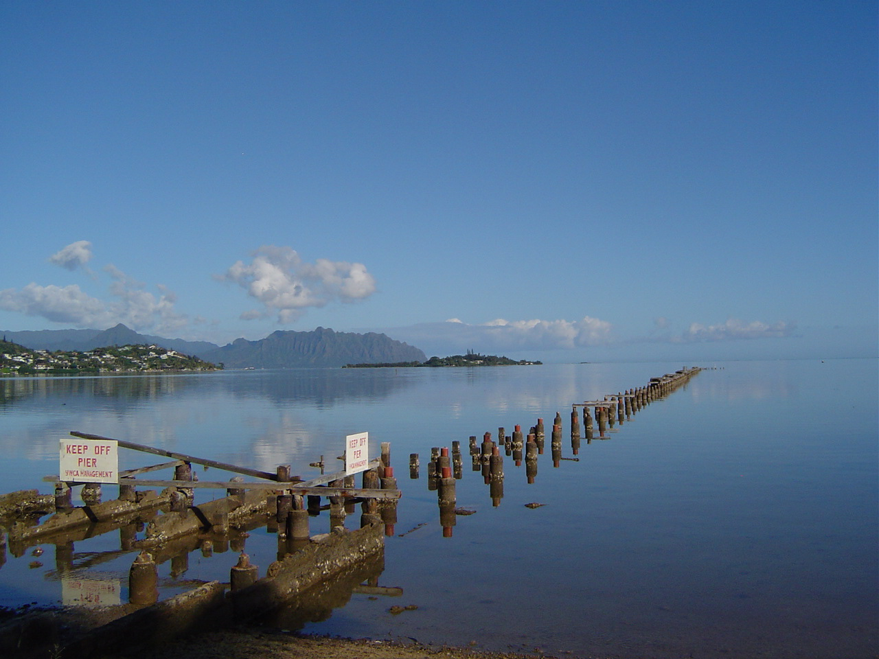 Kaneohe Bay, Hawaii